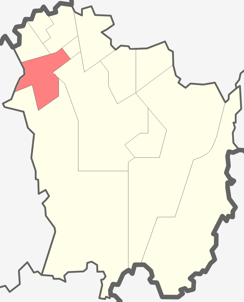 Форносовское городское поселение Тосненского района Ленинградской области